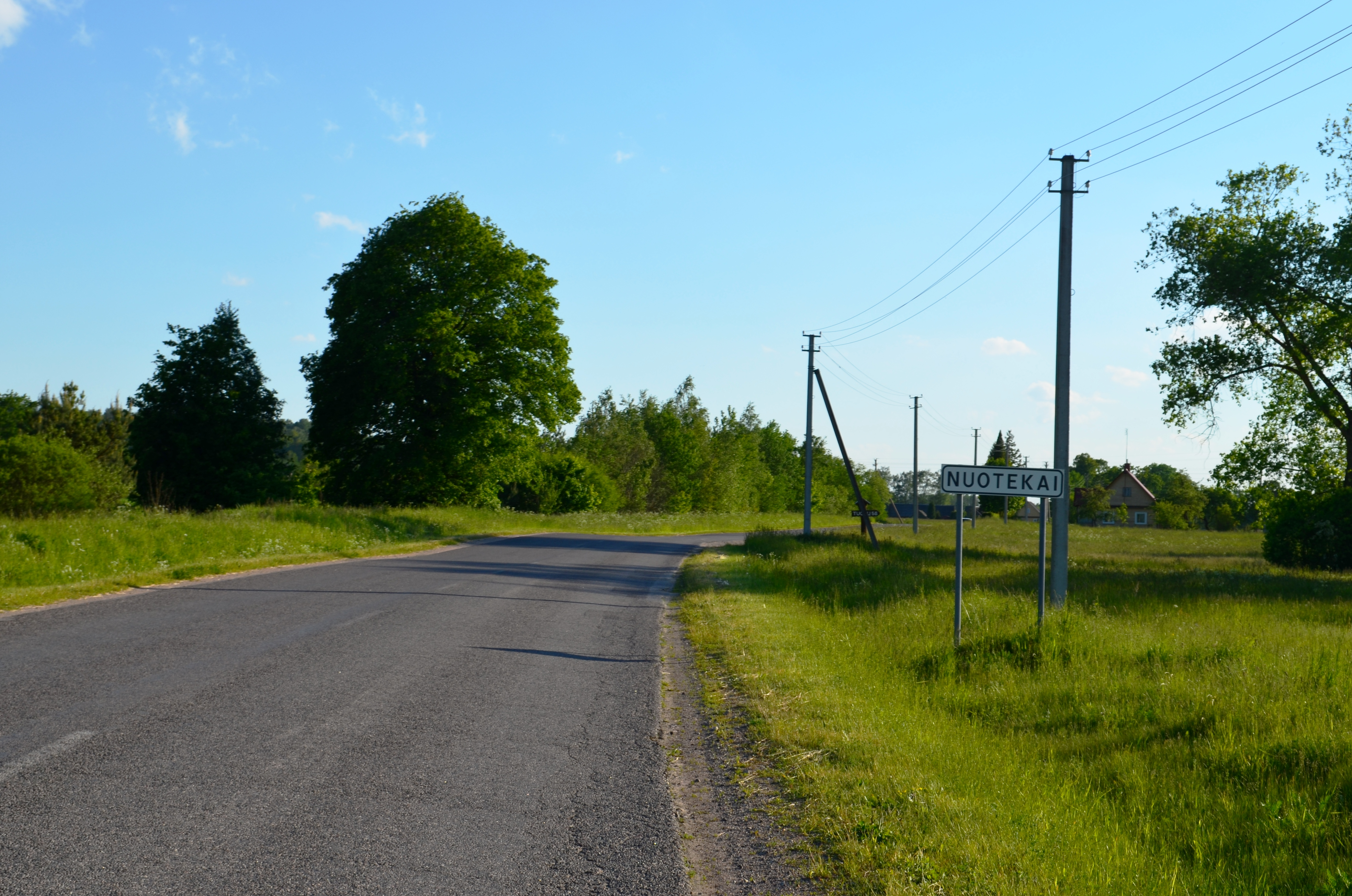 Nuotekai, Ukmergės raj.